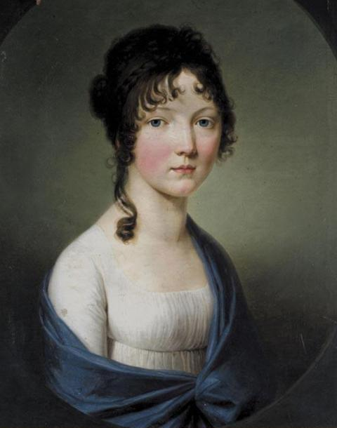 Princess Marie of Baden (1782–1808) aka Prinzessin Maria Elisabeth Wilhelmine von Baden, married to Frederick William, Duke of Brunswick-Wolfenbüttel